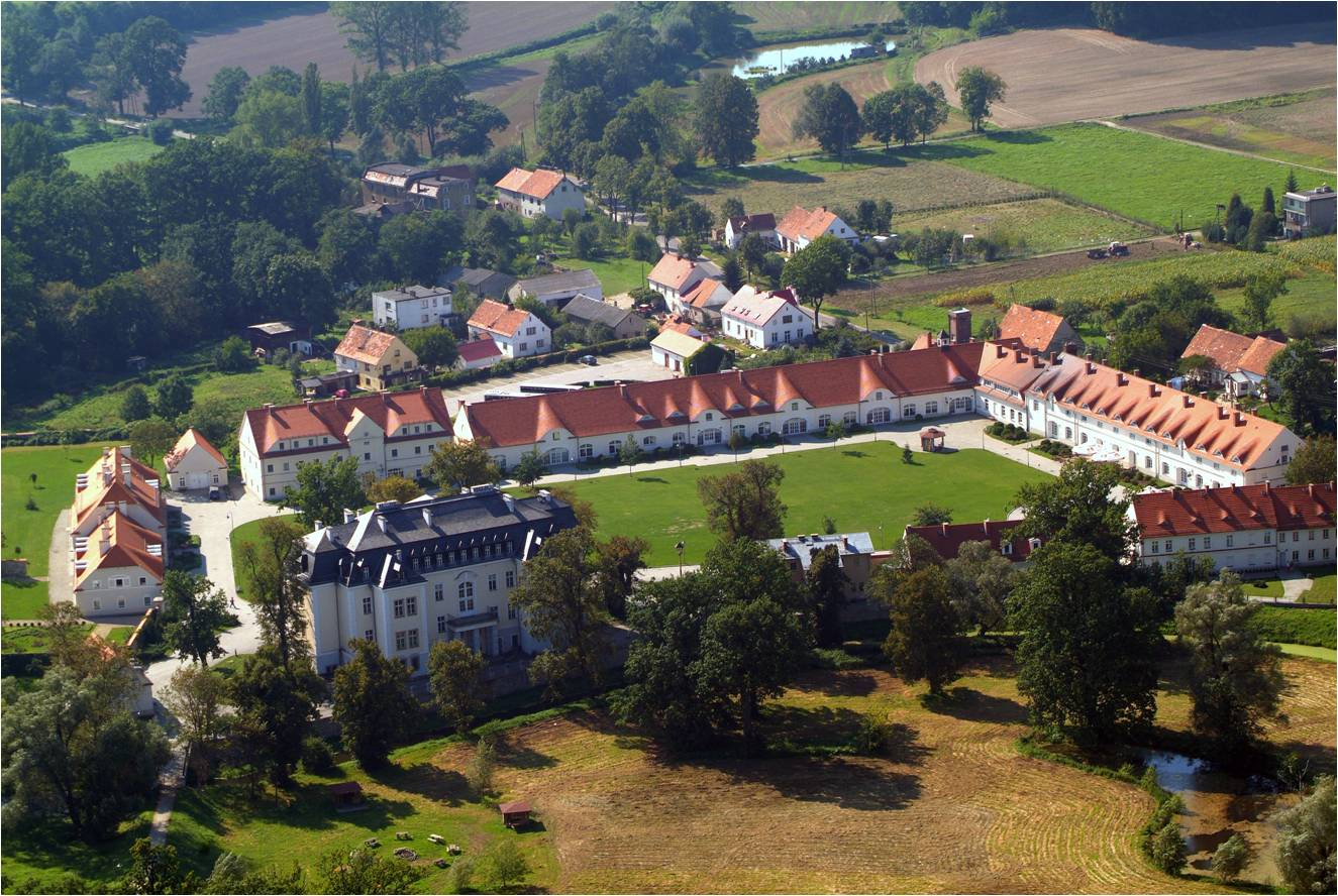 Fundacja "Krzyżowa" dla Porozumienia Europejskiego